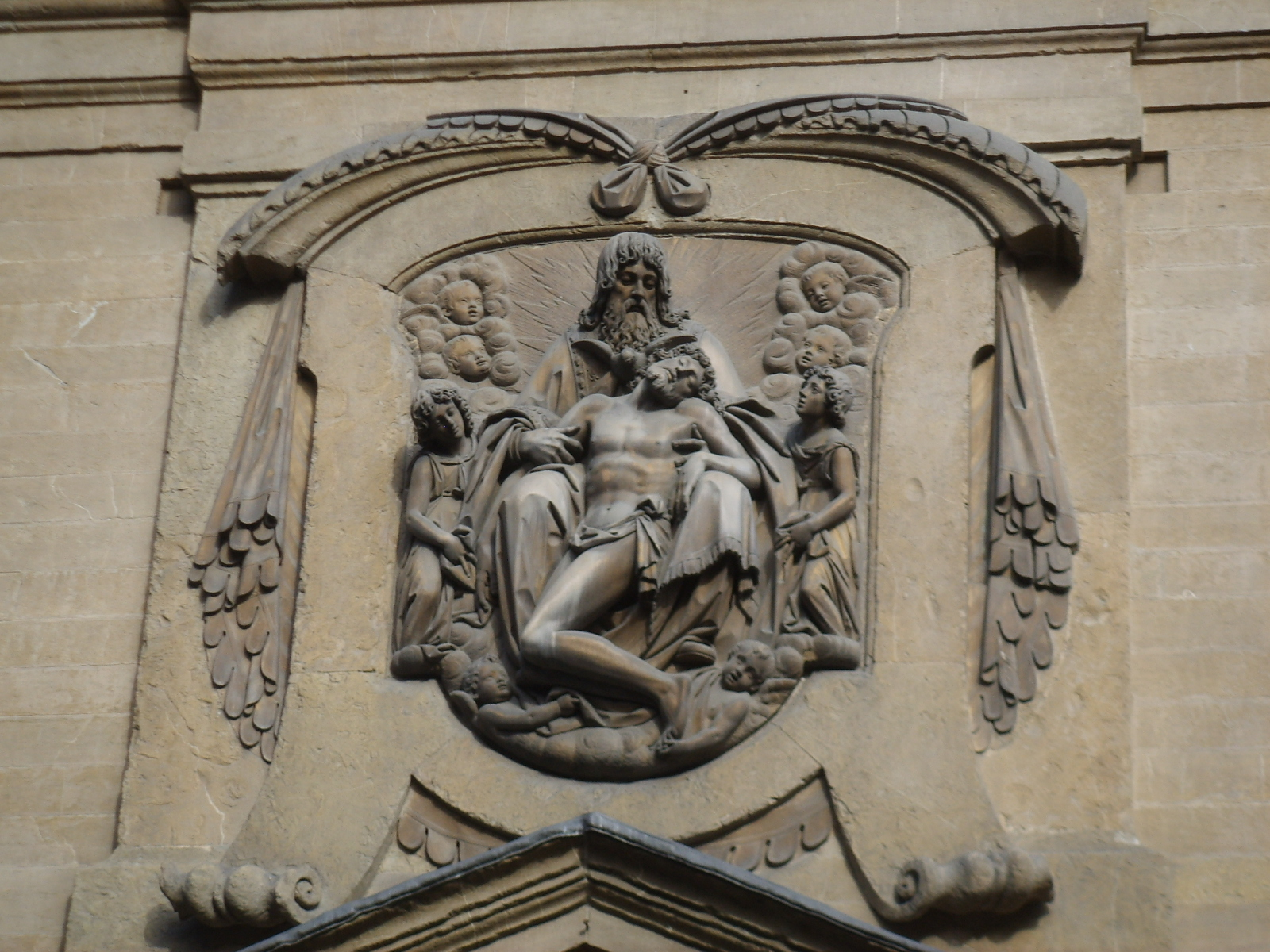 Santa trinita facciata